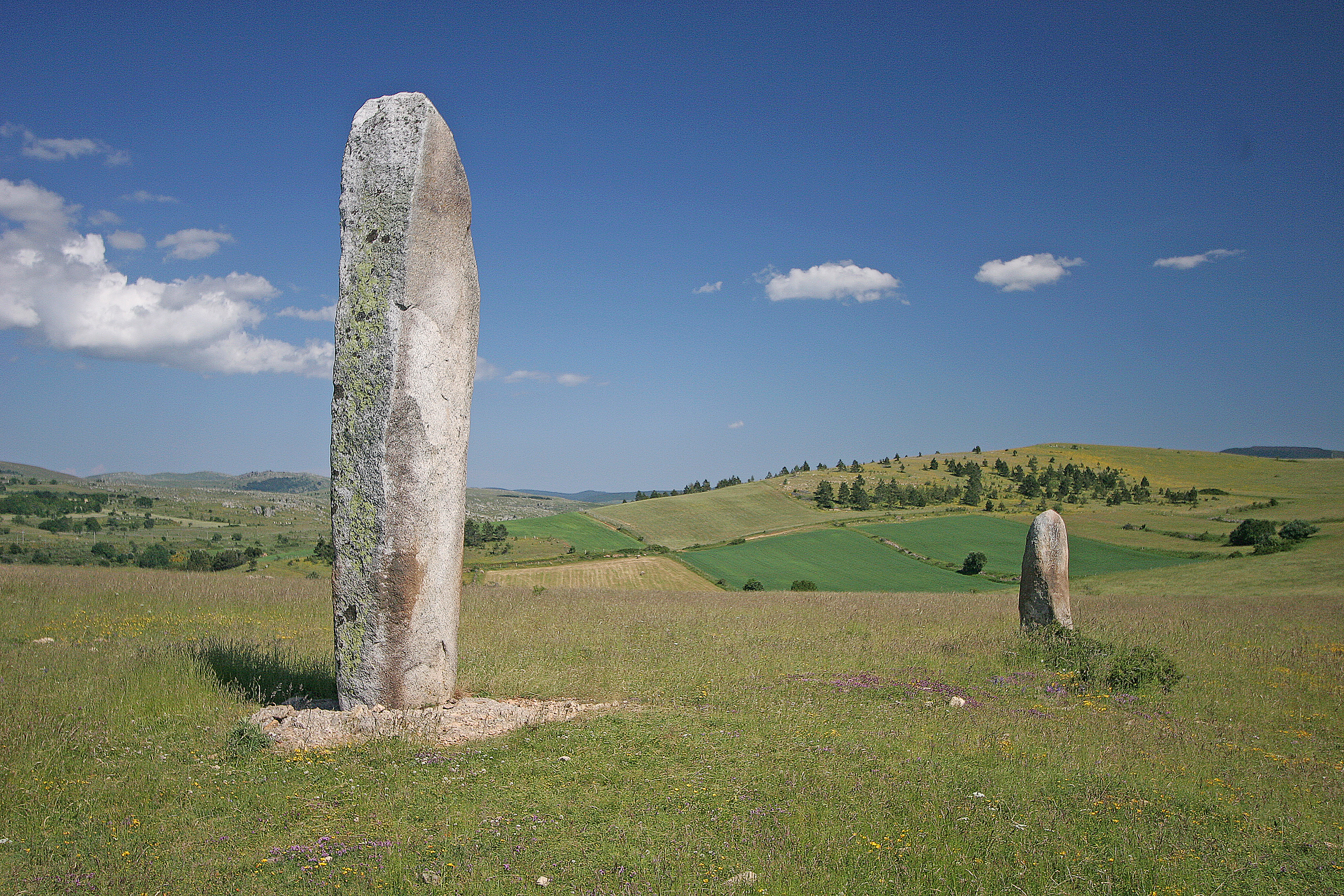 Menhirs de la Veissière